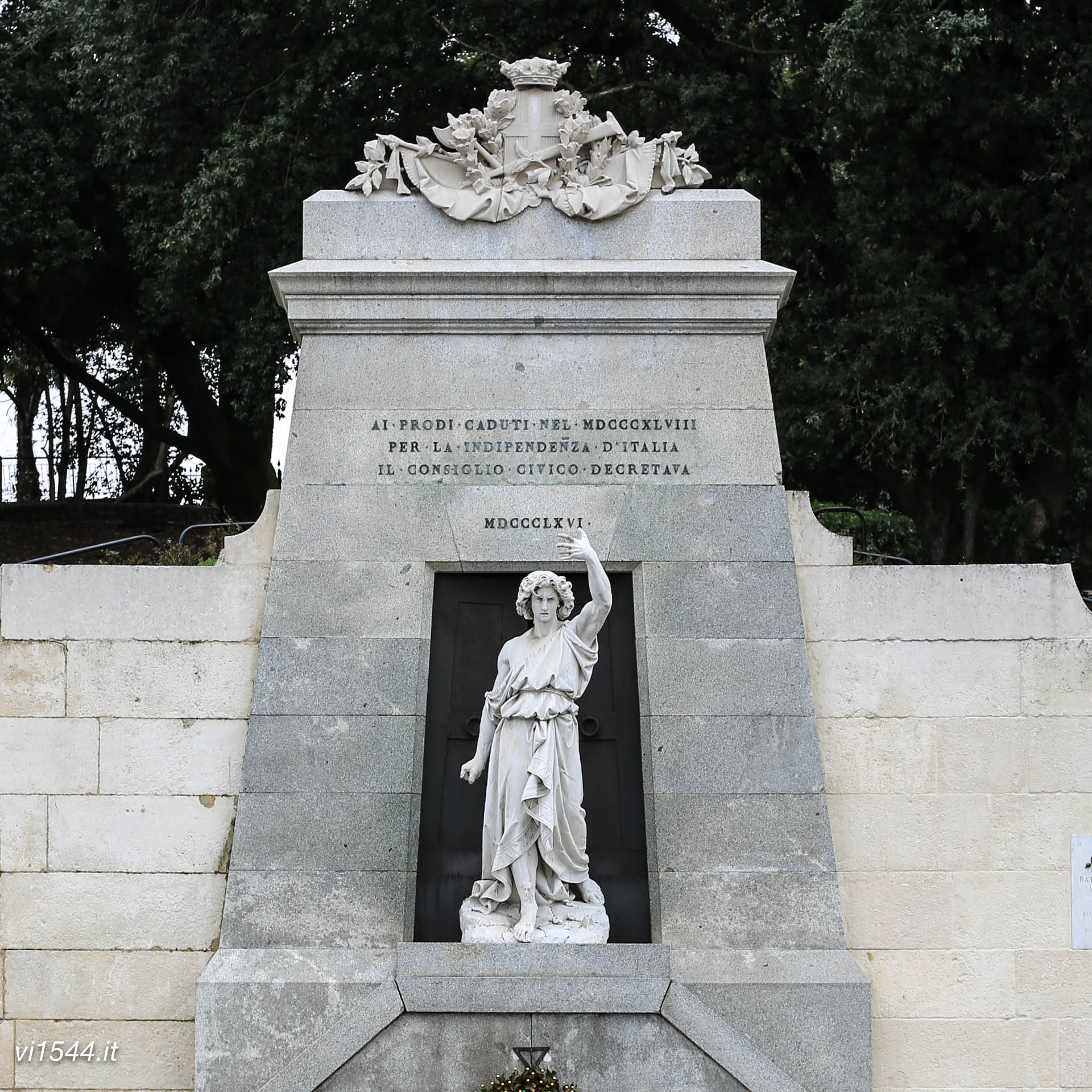 Scultura di Antonio Tantardini, raffigurante l'angelo della Vittoria. Vicenza, piazzale della Vittoria.